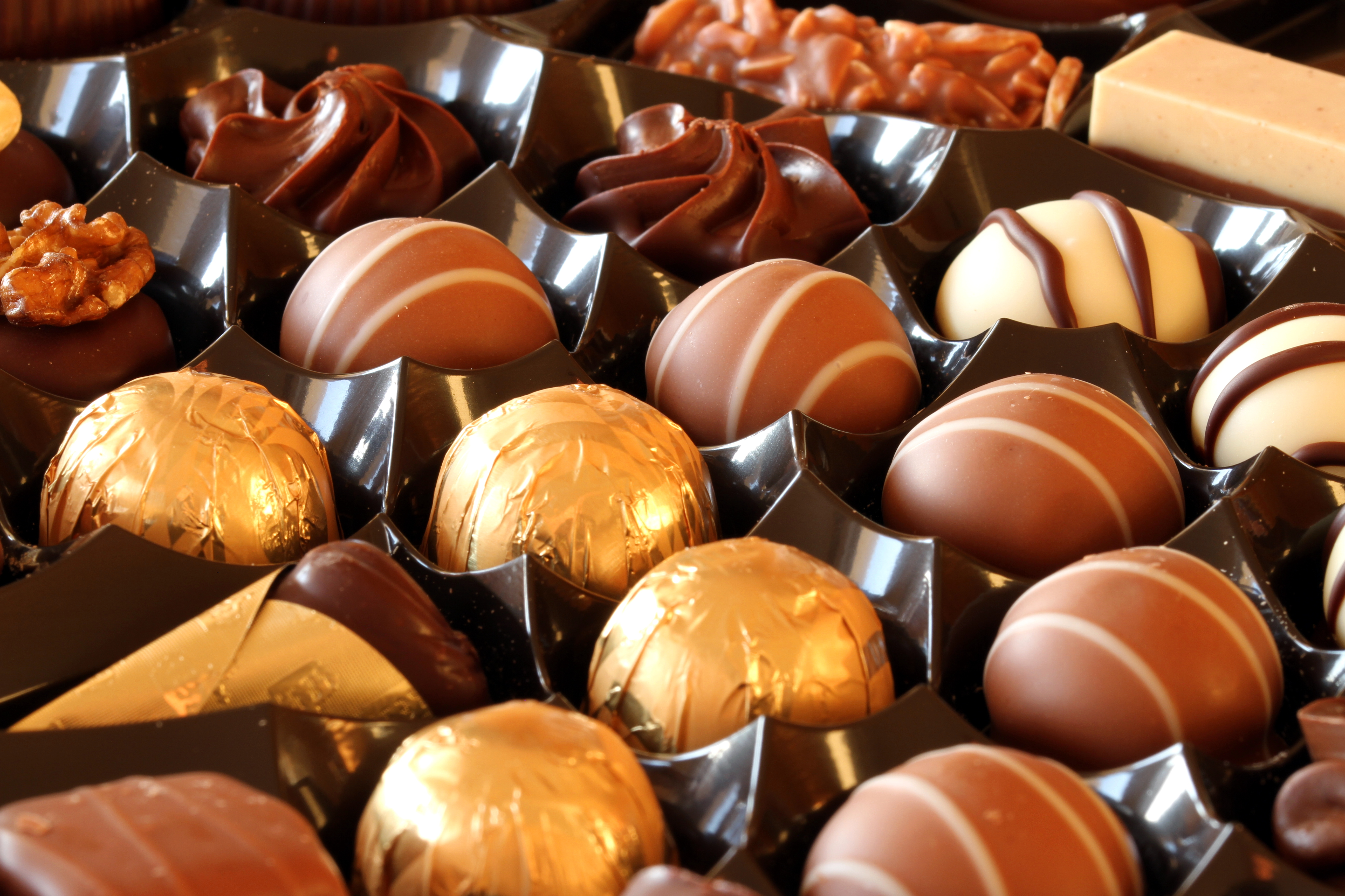 Kong Haakon-konfekt.